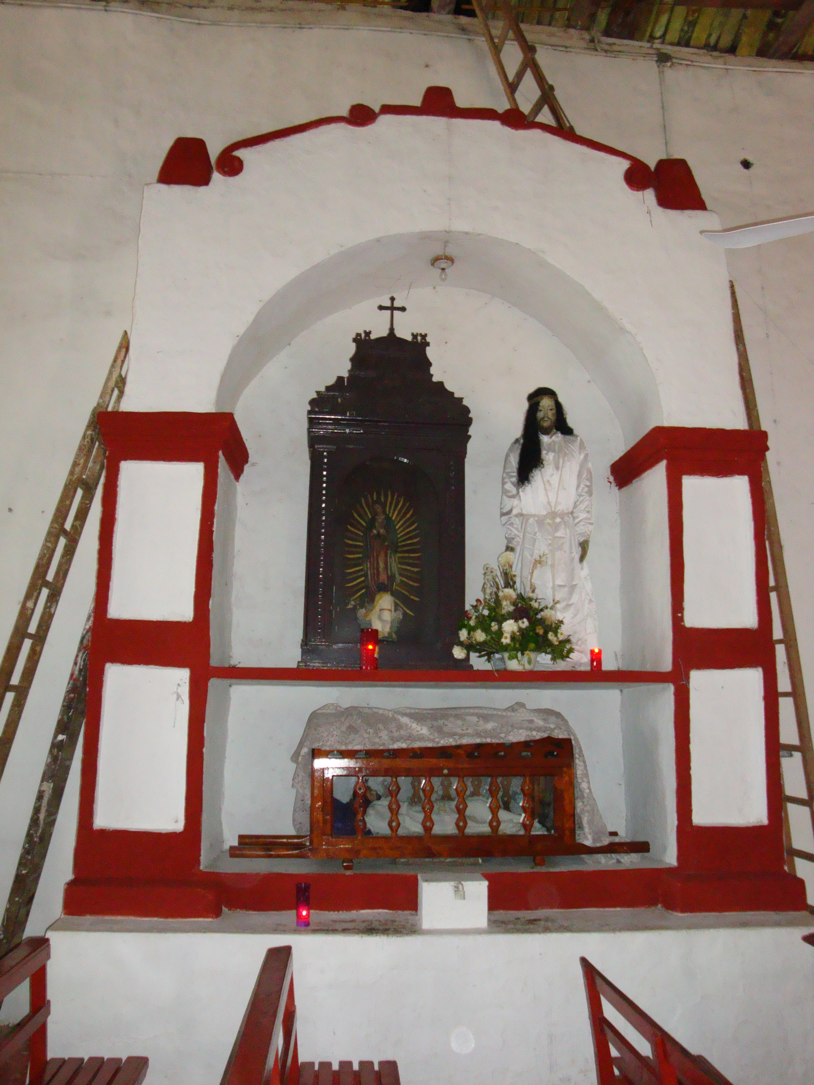 Altar de la Iglesia de Santiago Apóstol, en villa Tapijulapa,, municipio de Tacotalpa, Tabasco, México